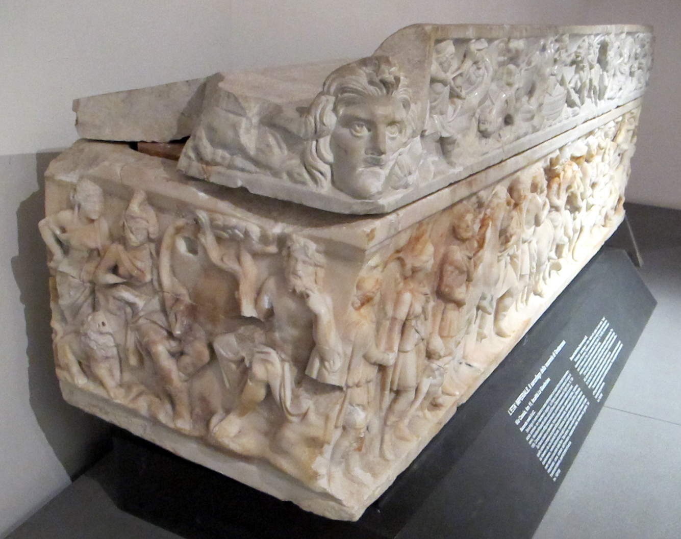 Sarcofago della mummia di grottarossa, con caccia al cervo di enea e didone, da via cassia loc. la giustiniana, 150-200 dc ca. 02.JPG